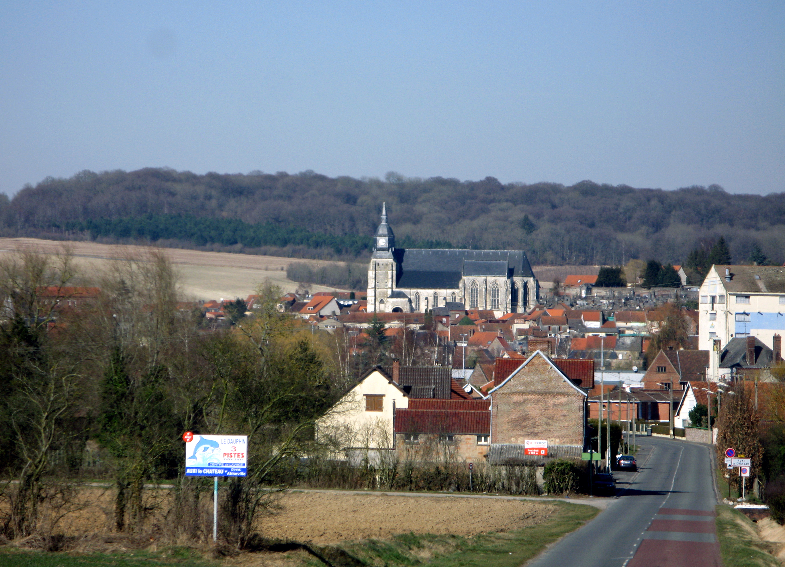 Auxi-le-Château (Pas-de-Calais, France) - Panorama sur la ville. .